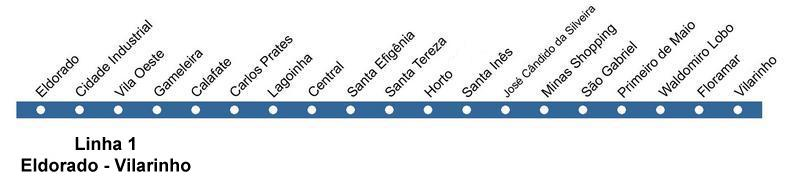 Metrô BH - Linha 1 - Vermelha